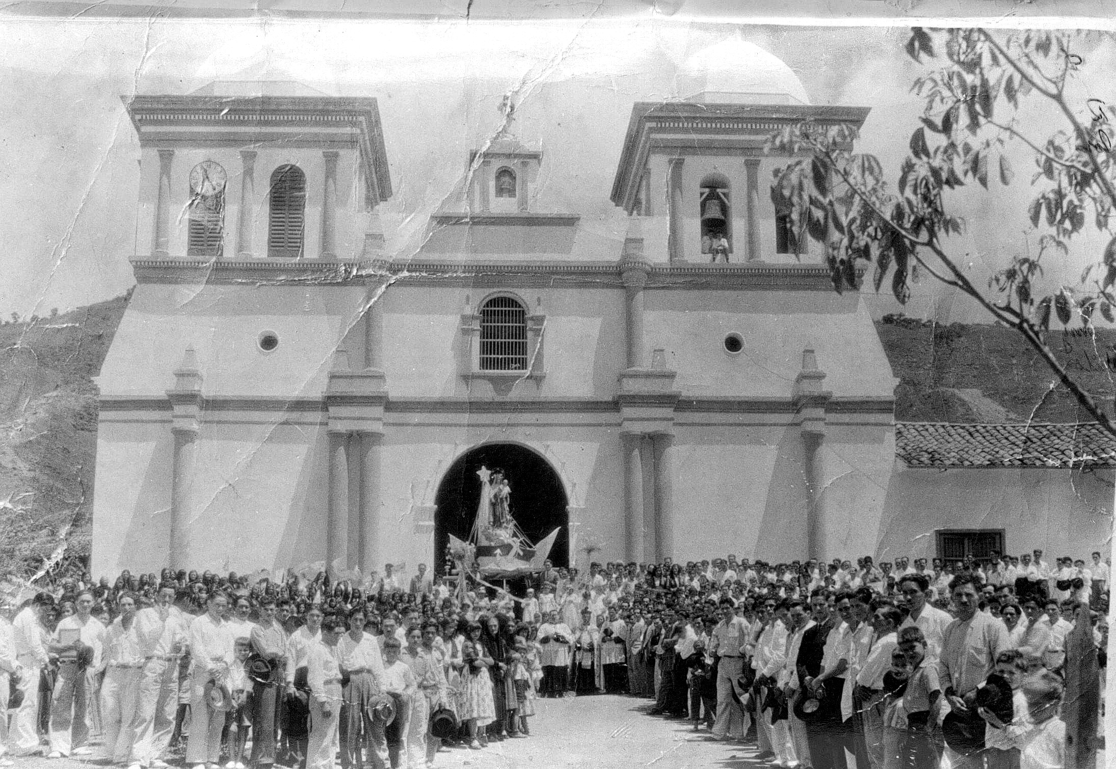 Antiguo templo parroquial de Betulia, Santander (años 1950)